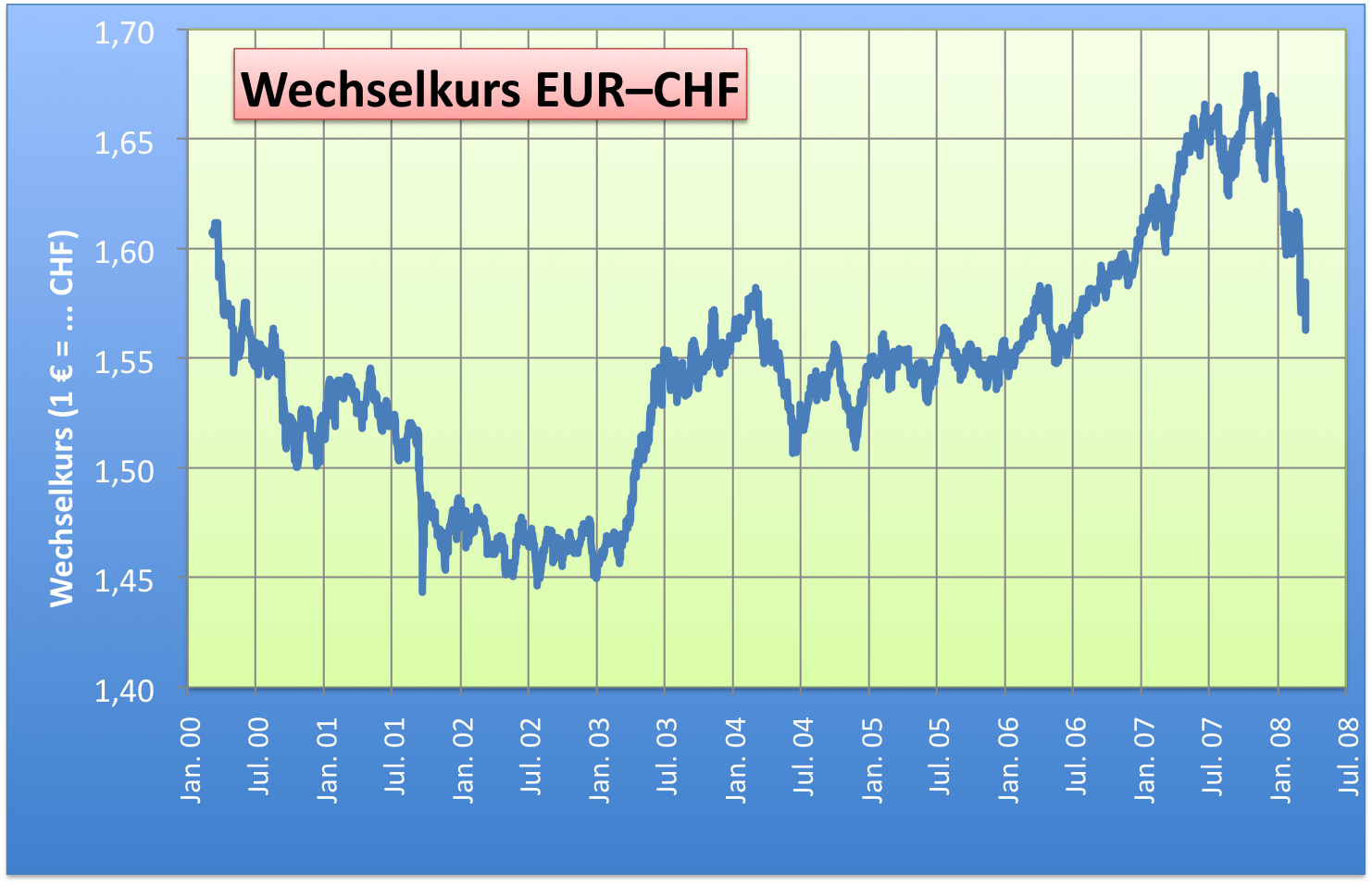 Wechselkurs EUR/CHF 06.03.2000 bis 11.03.2008